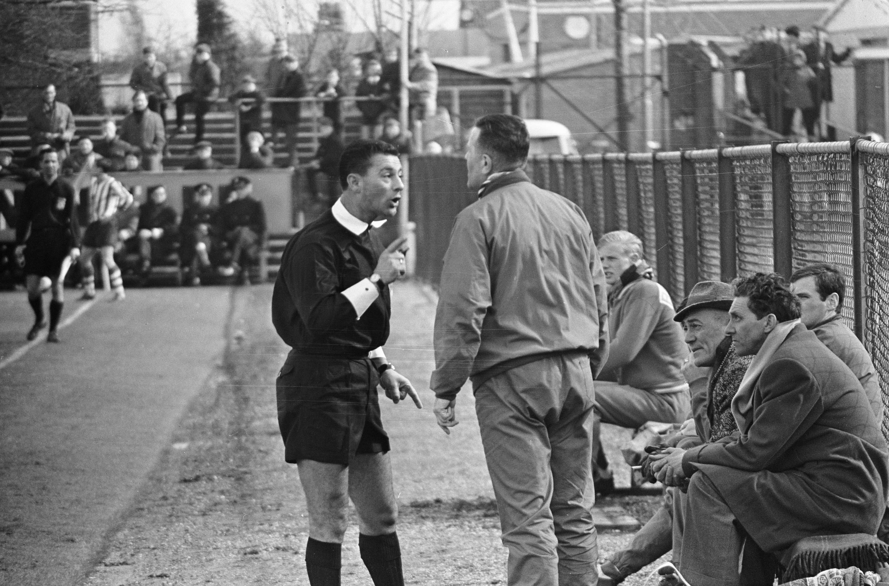 Elinkwijk tegen Sparta, scheidsrechter K. Brouwer geeft trainer Thompson (Sparta) een terechtwijzing. Datum 26 maart 1966